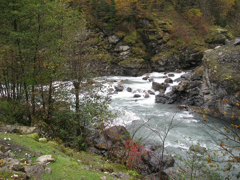 Enguri rivier